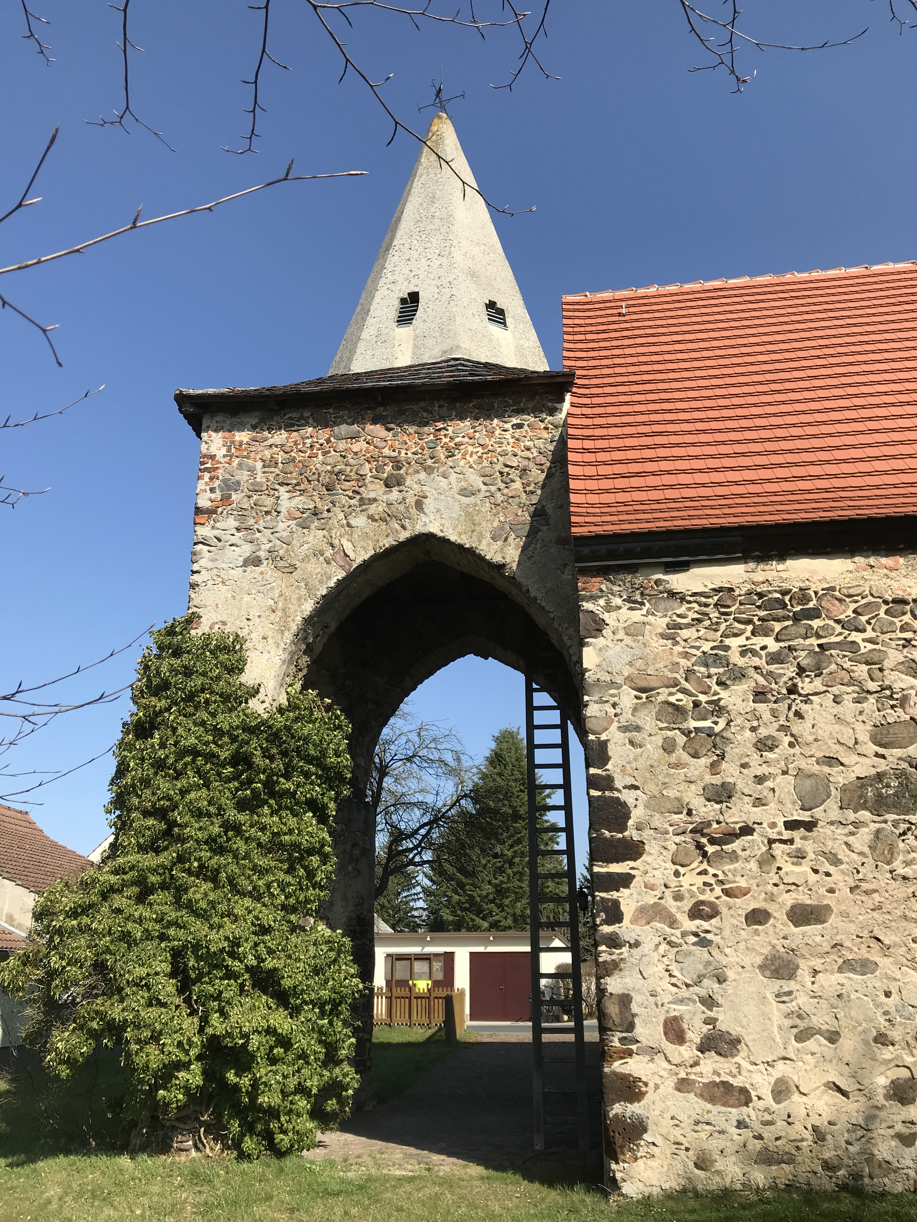 Die Dorfkirche Walddrehna ist eine mittelalterliche Feldsteinkirche, dessen Baugeschichte unter Experten umstritten ist.